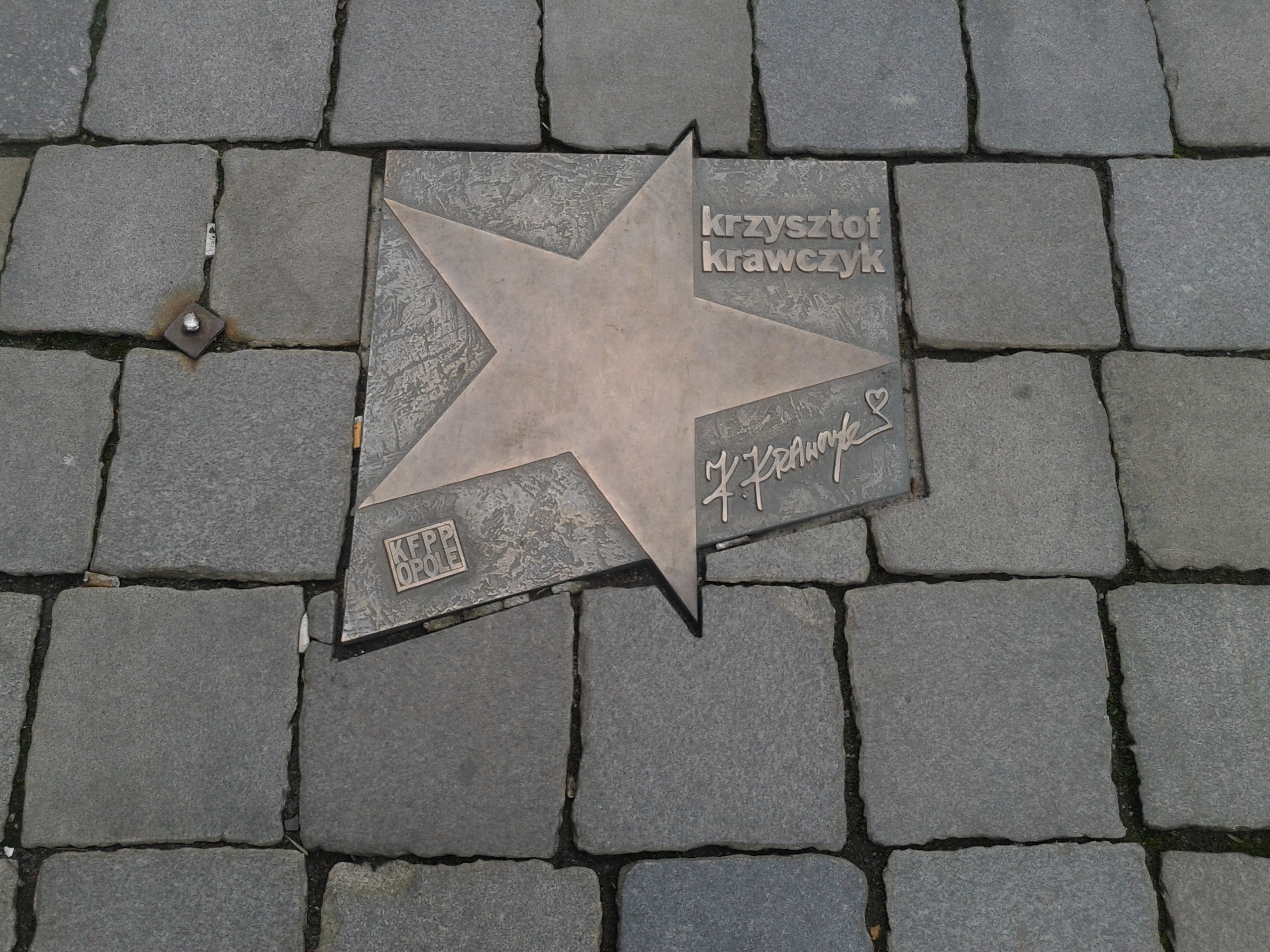 Gwiazda Krawczyka w Alei Gwiazd Polskiej Piosenki w Opolu.